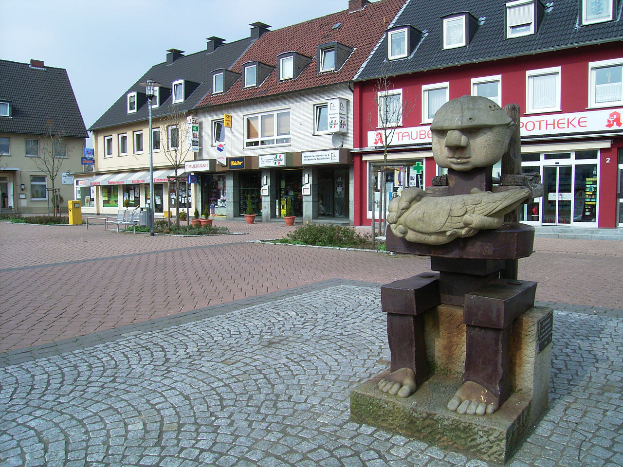 Unna-Königsborn, Deutschland, Marktplatz mit dem "Taubenkasper" der Gruppe "Kontakt-Kunst" Otto Almstadt, Moritz Bormann, Hans-Werner Kalkmann, Bodenburg 1981